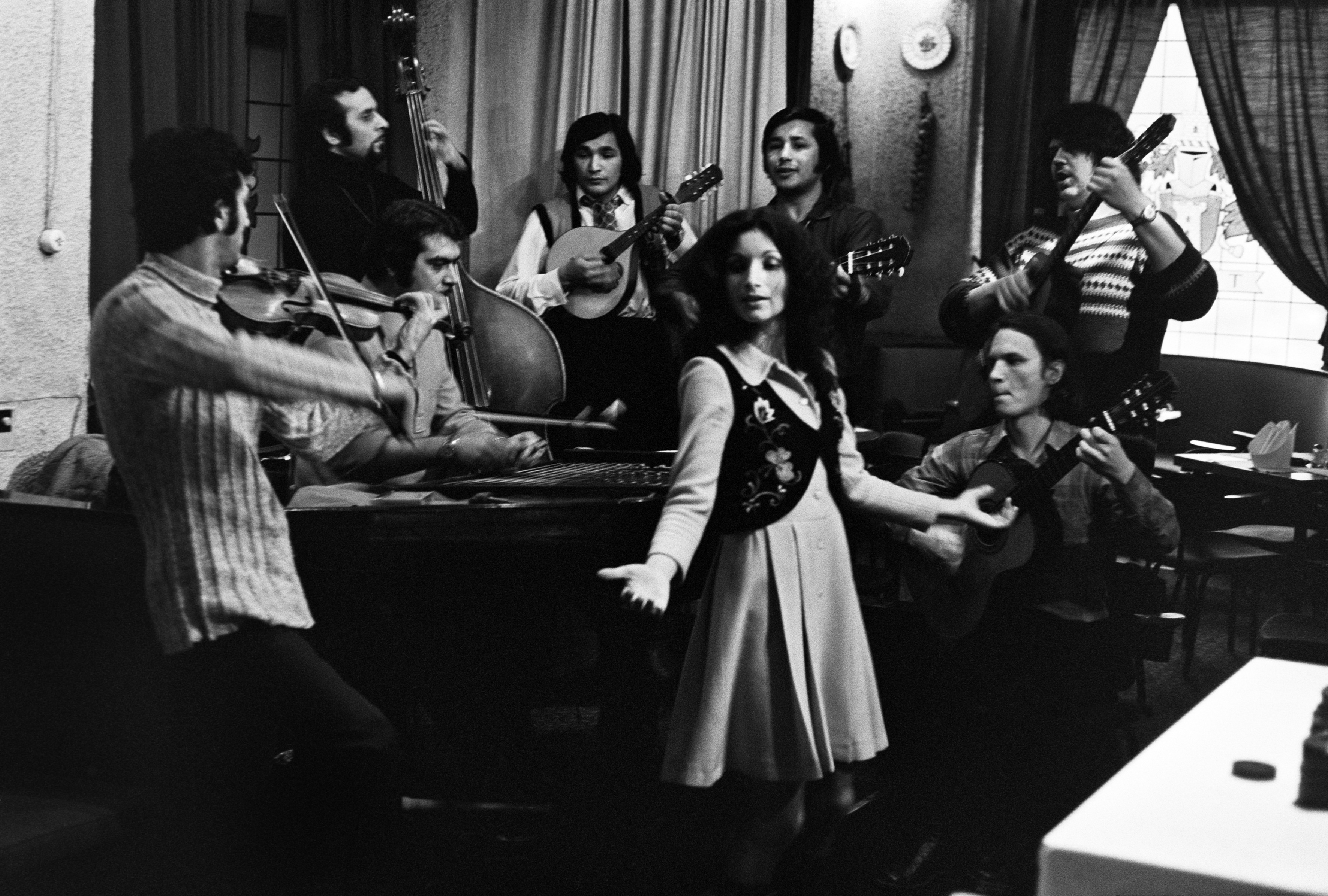 Hortto Kaalo, ensimmäinen romanimusiikkiin erikoistunut yhtye Suomessa, esiintymässä Hotelli Tornin ravintolassa. Kuvassa yhtyeen perustajajäsenistä Feija Åkerlund, Taisto Lundberg ja Marko Putkonen. Lisäksi kuvassa keskellä laulaja Anneli Sari, oikealla säveltäjä Pekka Jalkanen. Vasemmalla muita muusikoita.